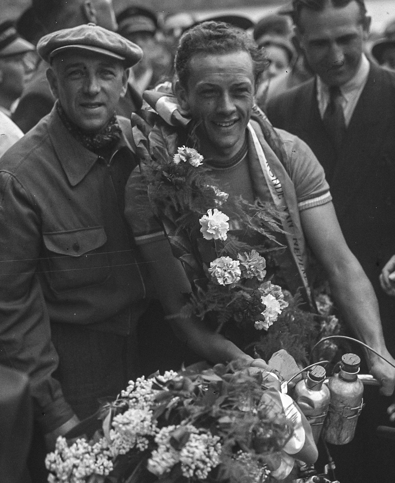 De Jang Goldschmit, zweet Plaz an der éischter Editioun vun der Ronde van Nederland den 2. Mee 1948.